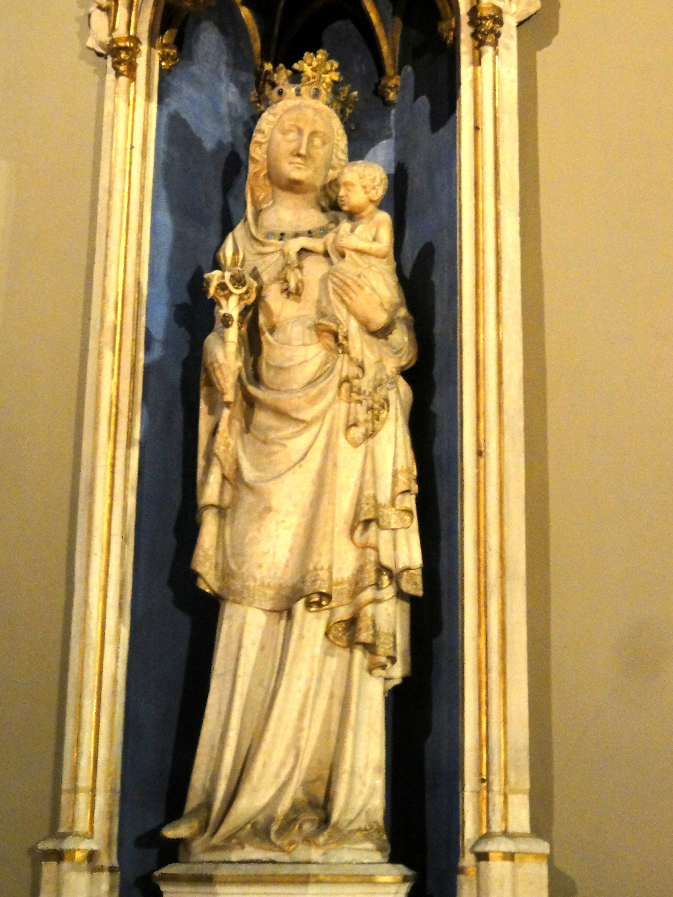 Bas-côté sud, statue d'une Vierge à l'Enfant dite N.D. de Consolation, en marbre, XIVe siècle.